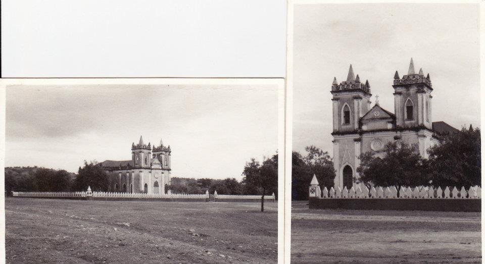 A Igreja de Laleia--Junho 1970